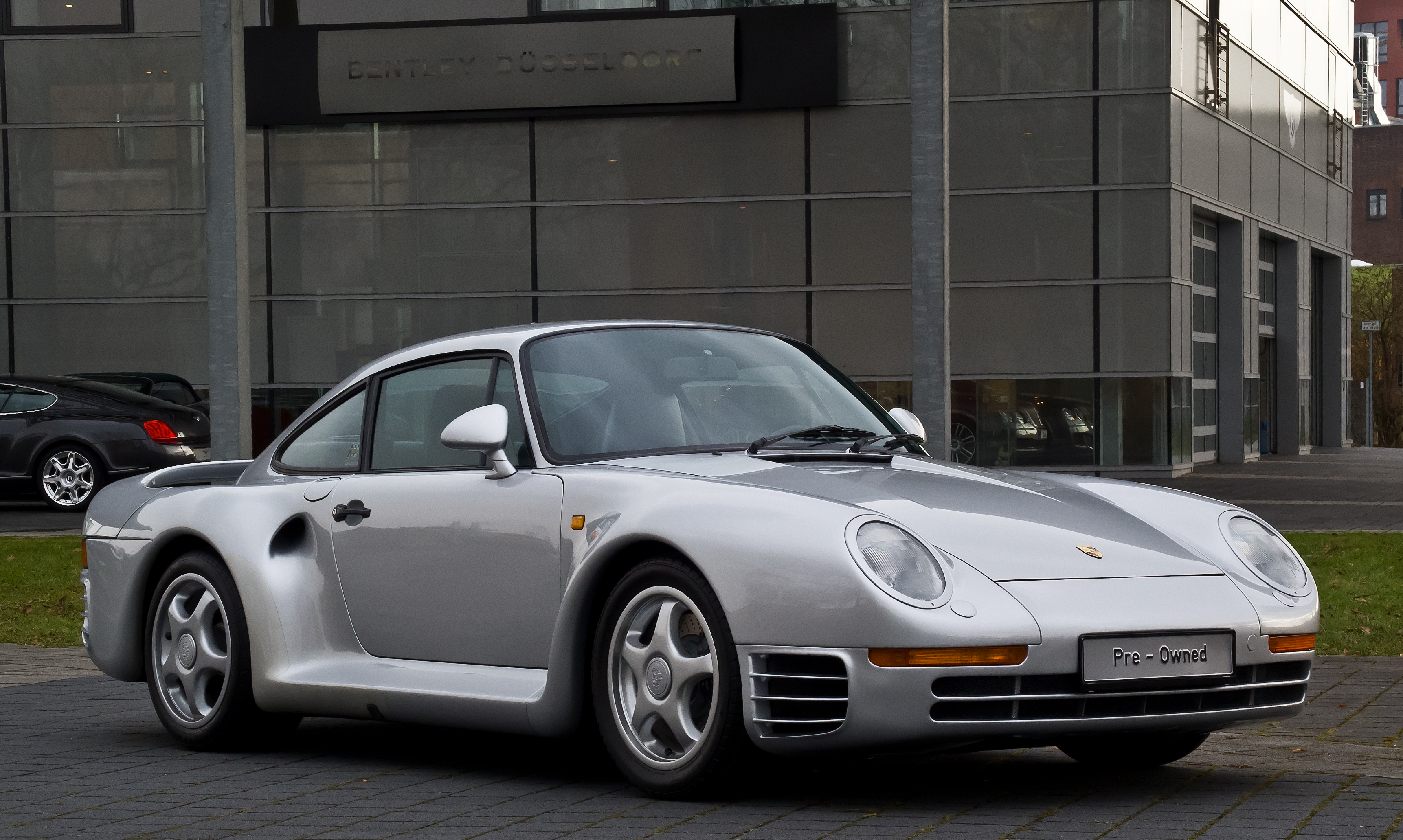 Frontansicht eines Porsche 959.